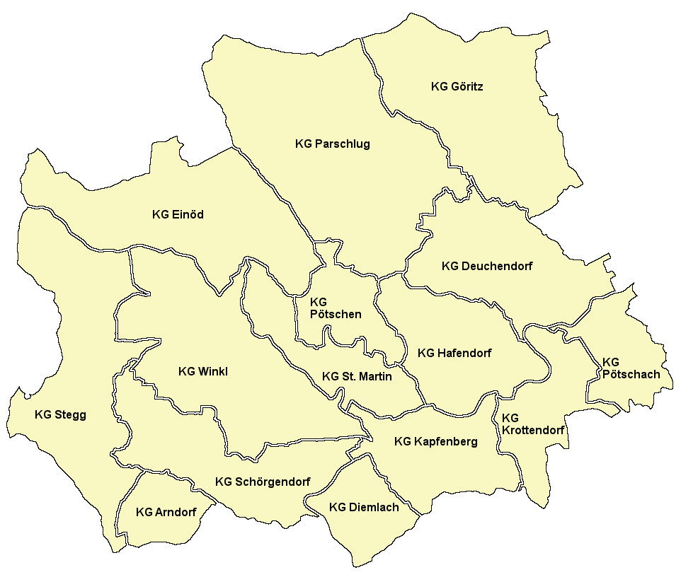 Eigenes Werk nach Vorlage